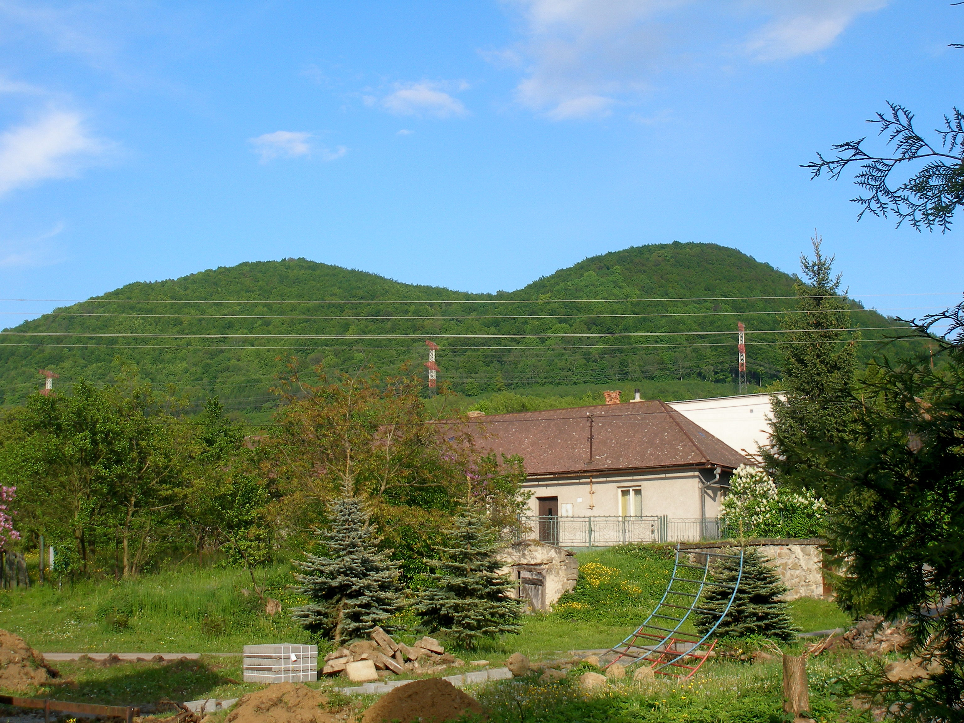 Hrad Šebeš alebo tiež Šebešský hrad, castrum Sebes, Sebeswar, hrádok Šebeš patrí do katastra obce Podhradík okres Prešov. Nachádza sa na pahorku nad obcou, ktorej názov pripomína lokalitu hrádku Podhradie (Waryala). Lokalita hradu je situovaná na zarastenej skalnej ostrožine na temene ktorej sa črtajú dnes už málo výrazné zvyšky hradu Šebeš. Predtým na tomto mieste existoval majetok zvaný Havranov príbytok (Hulloudzalasa), ktorý bol v roku 1285 už opustený. Pomenovanie Havran vychádzalo z oblečenia čierneho habitu príslušného rytierskeho rádu, preto sa predpokladá, že pôvodne tam stál drevený strážny hrádok. Na začiatku 14.storočia sa kopec nazýval Mačka, dnes Zámek. V donačnej listine kráľa Karola Róberta z roku 1315, ktorou potvrdil Tomášovmu synovi rytierovi Synkovi vlastníctvo jeho doterajších majetkov v tejto oblasti, ktorých súčasťou bol aj hrad. Predpokladá sa, že v rokoch 1307-1315 bol hrad vystavaný ako kamenný. Hrad patril až do roku 1491 Synkovým potomkom. Kráľ Vladislav ho potom daroval mestu Košice, zanikol v roku 1550, keď ho obyvatelia Prešova vypálili. Majitelia hradu totiž nemali dobré vzťahy so susedným mestom Prešov. Spor sa v roku 1475 dostal až pred súd, ale ani ten spor nevyriešil. Majiteľ hradu František Sebesi chcel spor vyriešiť dohodou, preto poslal richtárovi Prešova posolstvo, aby spor vyriešili pokojnou cestou. Richtár to zneužil, vtrhol na hrad a dobyl ho. Hradného pána Sebesiho a kastelána Gerakiho dal obesiť na hradnú bránu a hrad nechal podpáliť. Panovník za to zosadil richtára a potrestal občanov mesta Prešov. Hrad však už neobnovili a po čase zanikol. Odvtedy pustol.